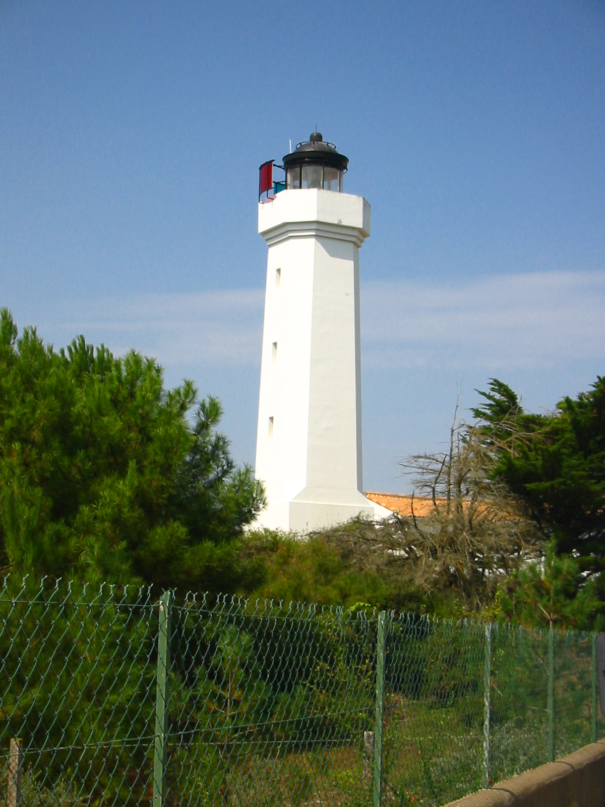 Phare de la Tranche-sur-Mer